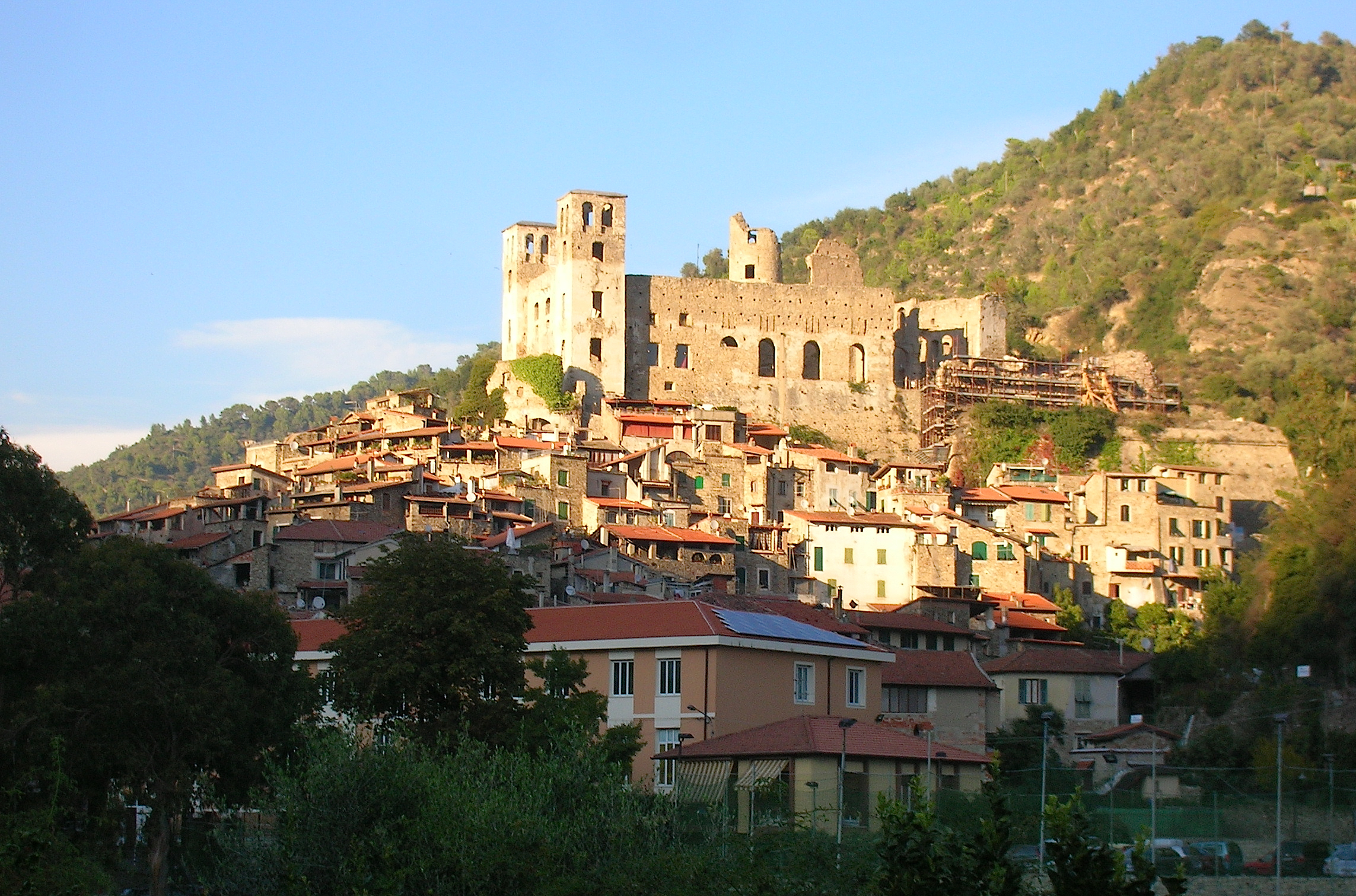 Castello di Dolceacqua, Liguria, Italia.